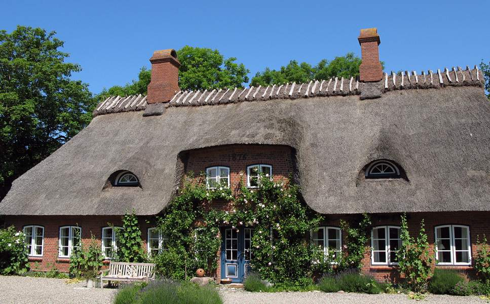 Das Landhaus Börmoos steht exemplarisch für die vielen gepflegten und schönen reetgedeckten Häuser zwischen Flensburg und Kappeln.